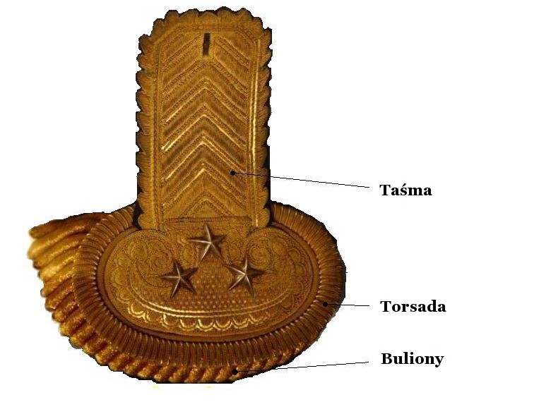 legende épaulette